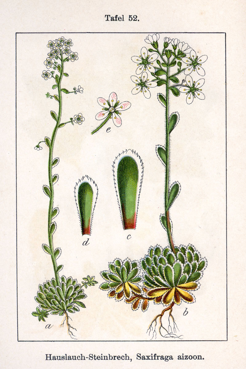 Saxifraga paniculata subsp. paniculata, syn. Saxifraga aizoon Jacq. Original Description Hauslauch-Steinbrech, Saxifraga aizoon